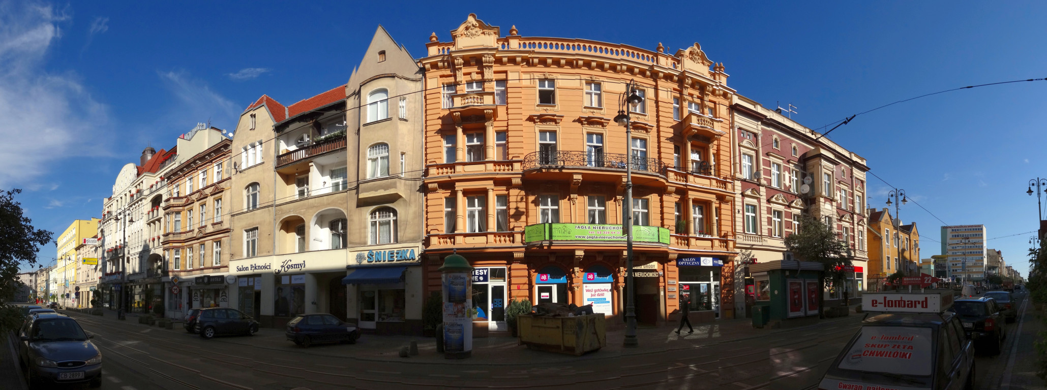 Ulica Gdańska w Bydgoszczy